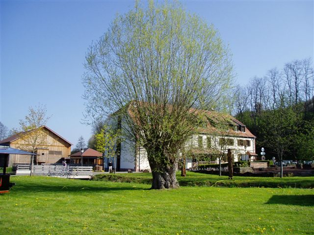 Eschviller